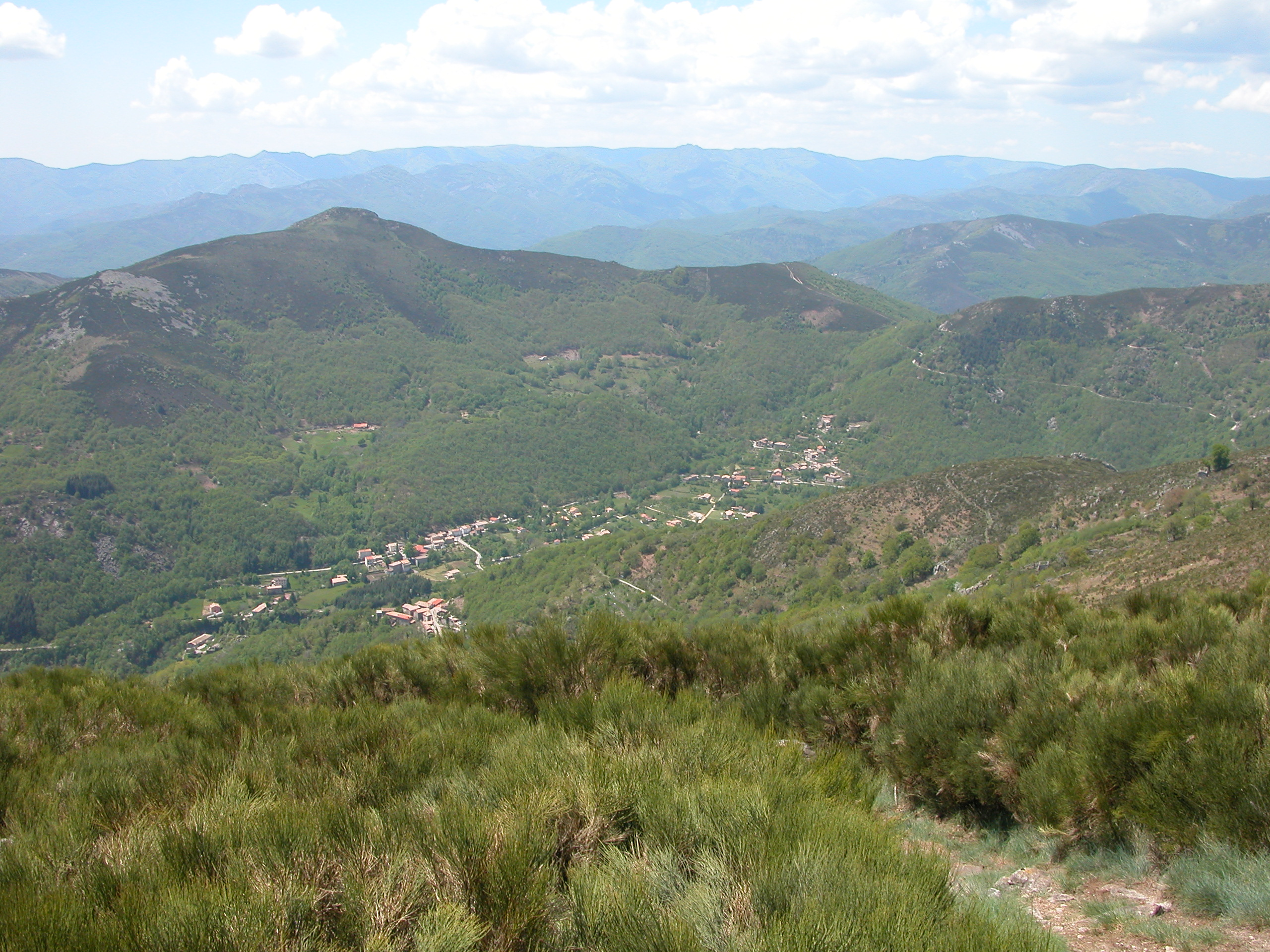 Labastide sur Besorgues et Moucheyres